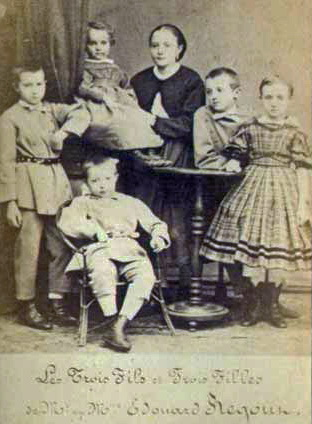 Portret van de drie zonen en drie dochters(?) van Hubert Edouard Thomas Regout (Eduard) Regout en Marie Marguerite Théodosie Léontine Kersten. Waarschijnlijk zijn dit de kinderen: Marie Hubertine Théodosie Gabrielle Regout (1852-1915), Marie Pierre Casimir Edouard Adrien Regout (1854-1930), Pierre Hubert León Regout (1855-1908), Marie Eugenie Hubertine Regout (1856-1935), Hubert Dieudonné Frédéric Regout (1858-1937) en Hubert Louis Gaston Joseph Regout (1862-1939). Foto in: Album de la famille de Mr. Pierre Regout à Maestricht. Vervaardigd door: Billon, Photographe, Neveu et Élève de Mr. Daguerre, rue des Recollets, 13, Paris. Bevat foto’s van diverse leden van de familie Regout en van de prenten uit het Album dédie à mes enfants et mes amis. Fotocollectie RHCL Maastricht, RAL P-0656-102.